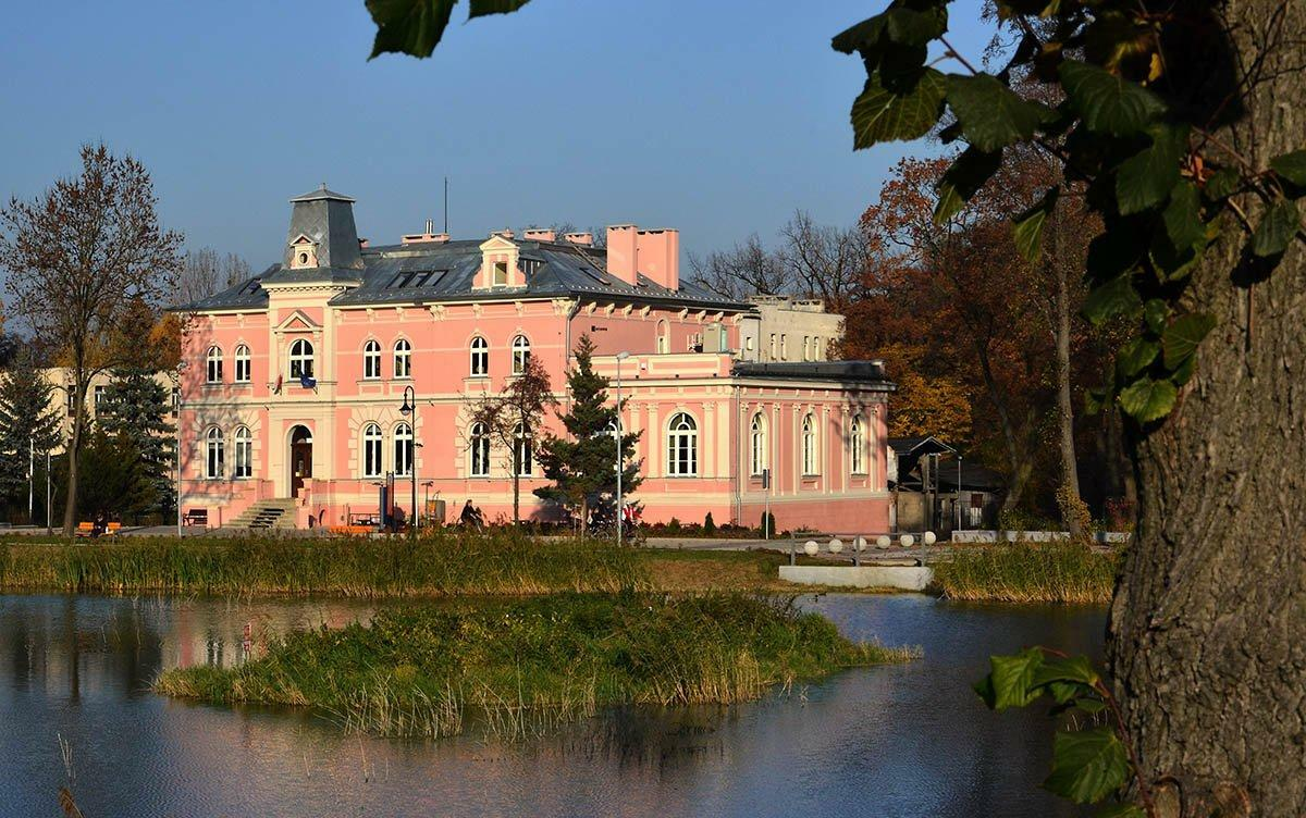 Starostwo Powiatowe